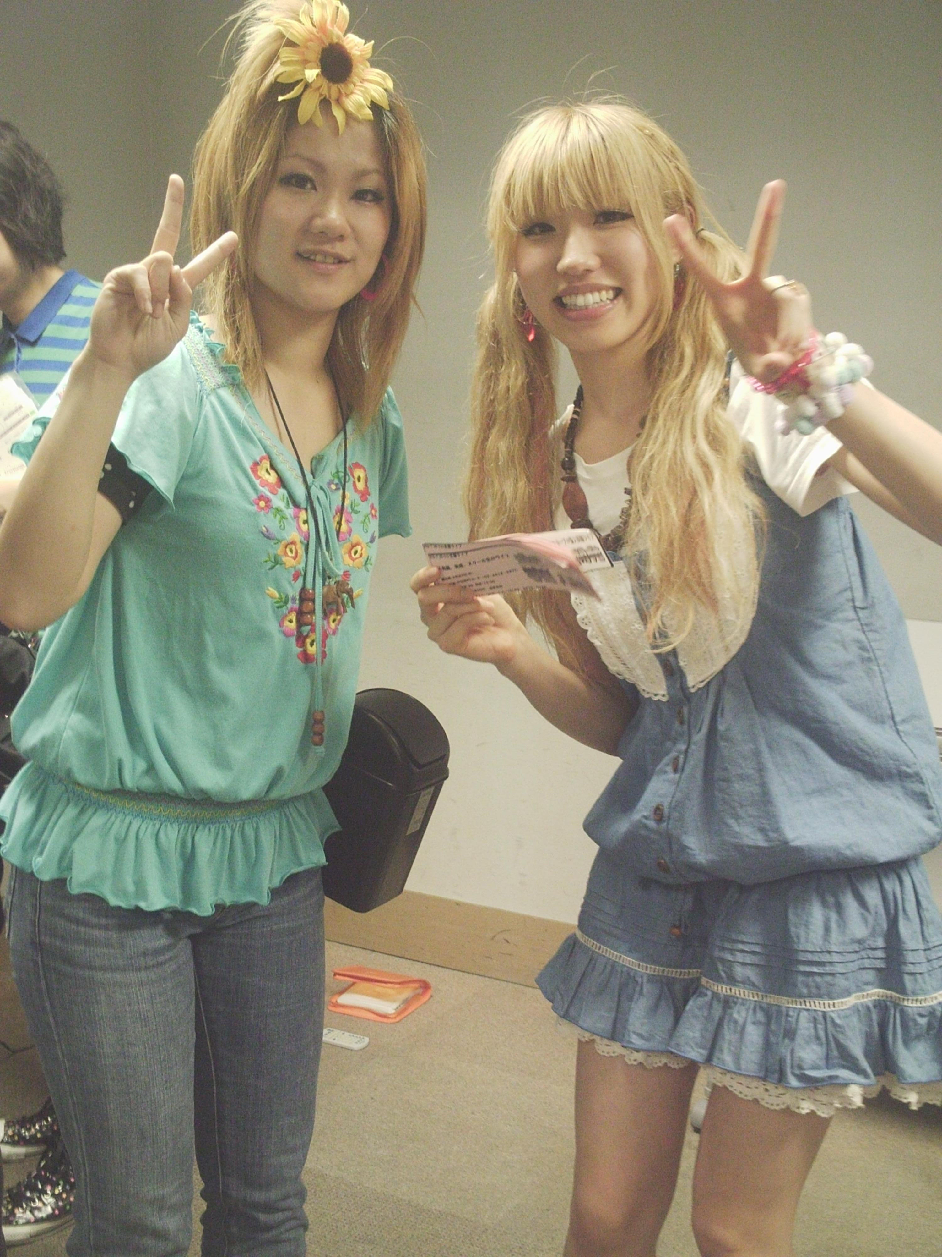 チェリーの果実 (2009年6月)